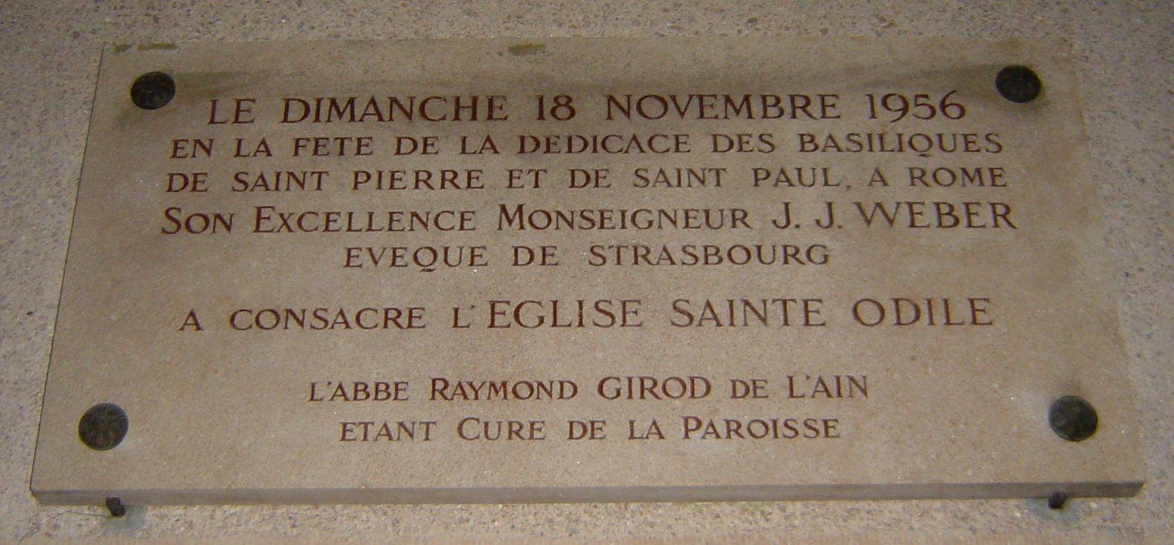 Photos prises à Paris